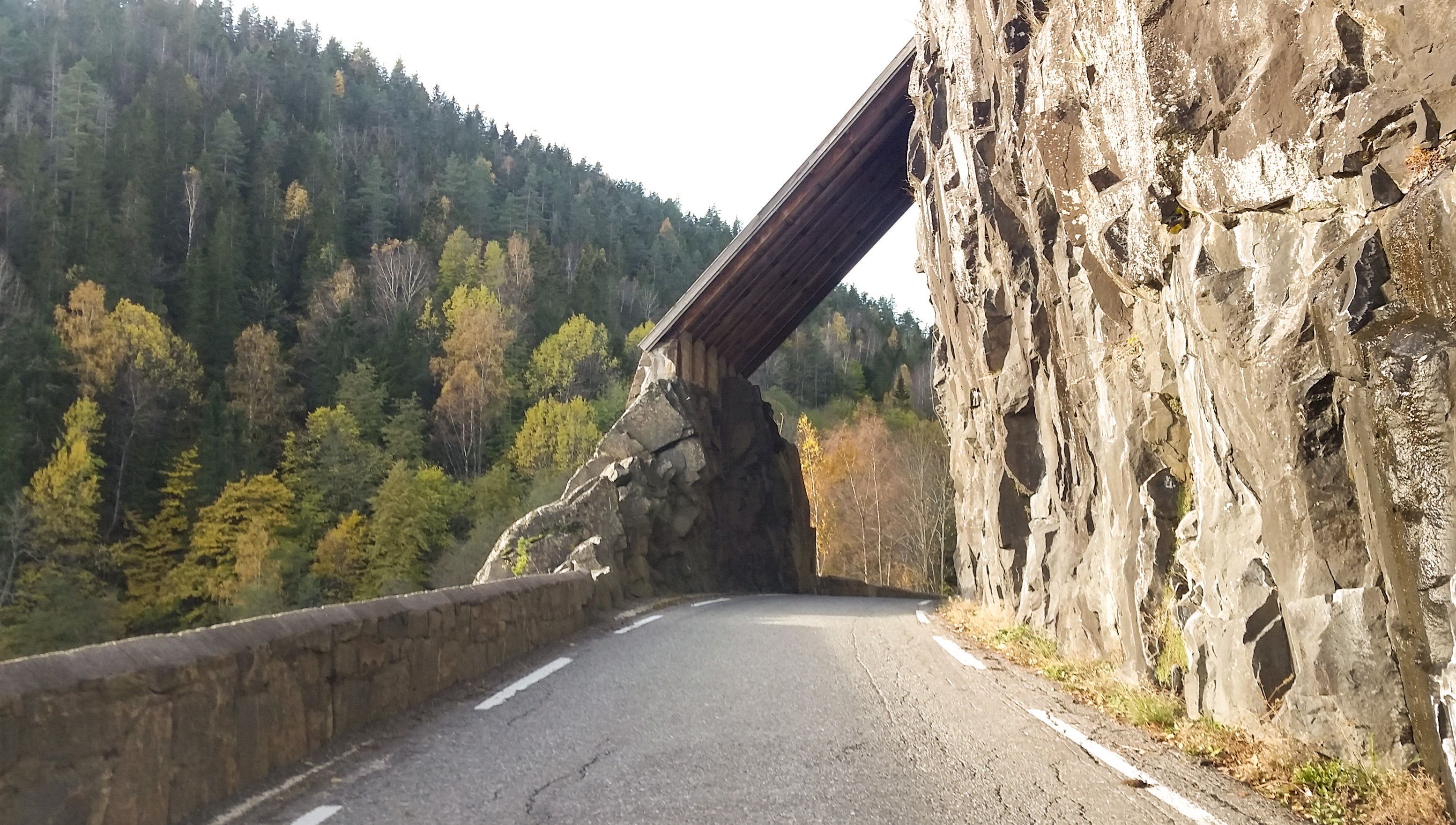 Askeklova rasoverbygg, Fylkesvei 363 ved Skjærsjø på grensa mellom Bamble og Kragerø kommuner i Telemark